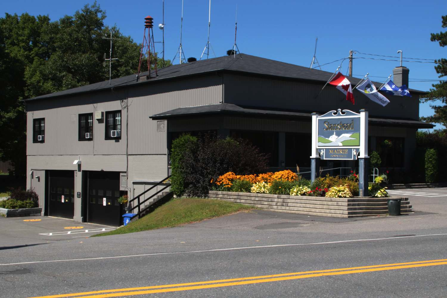 Marie de Stanstead, QC